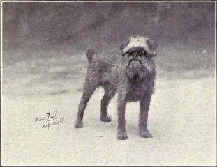 Brussels Griffon from 1915